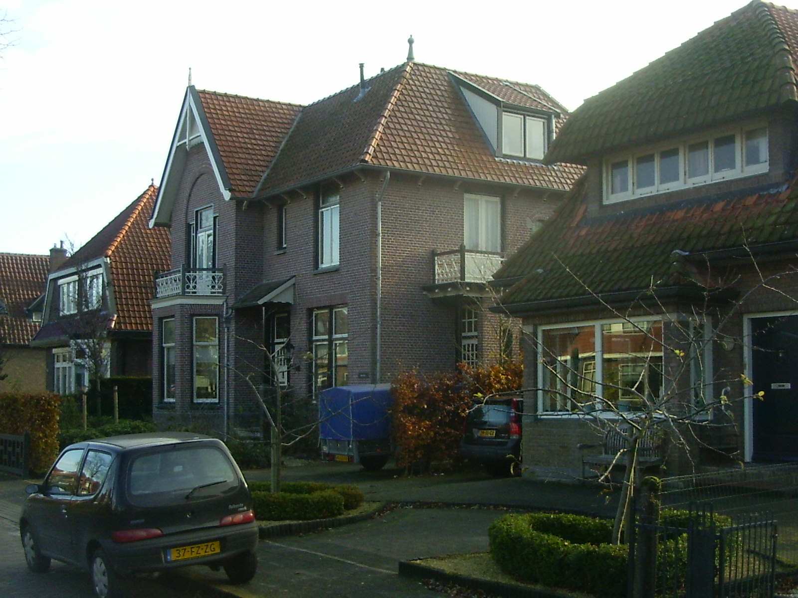 Steenwijk, Tukseweg 47, huisartsenpraktijk